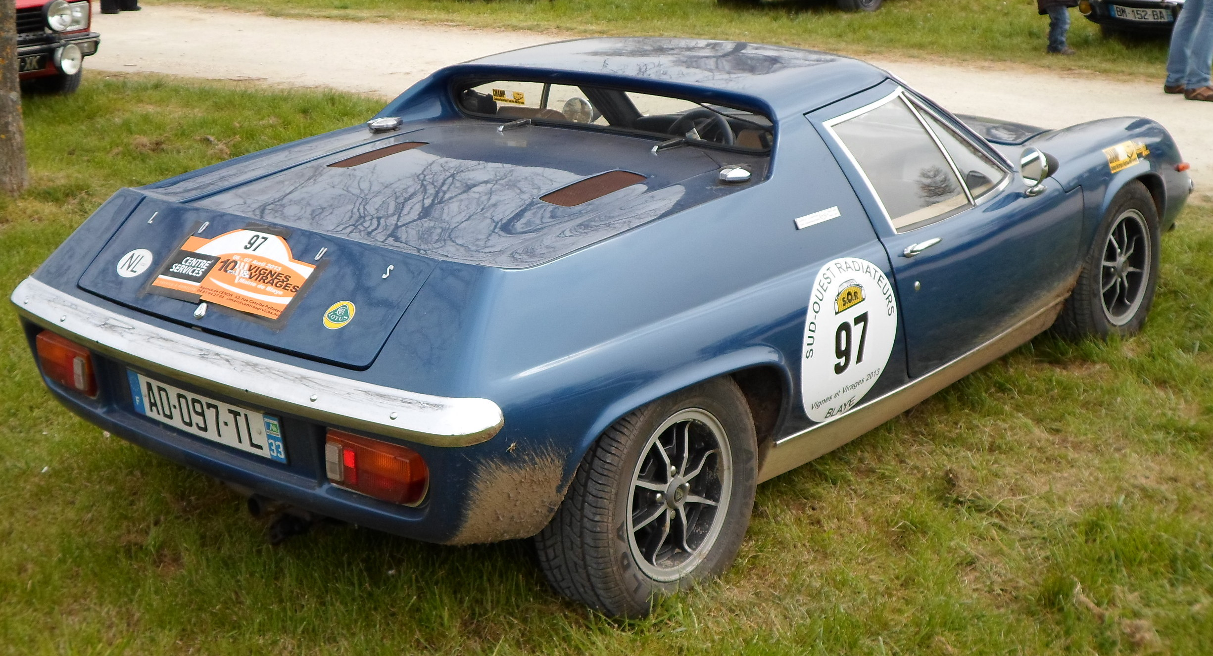 Lotus Europa Blaye 2013